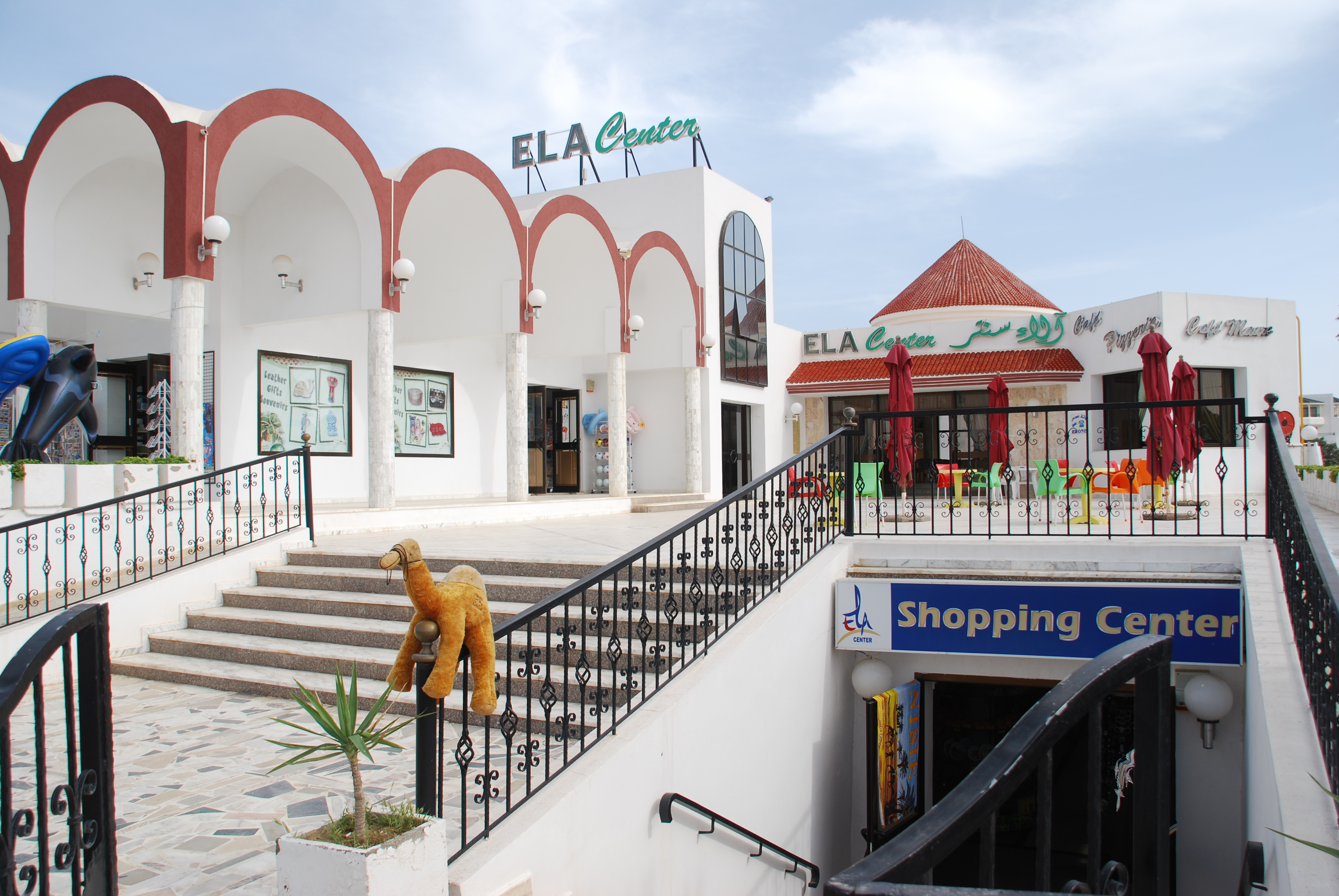 Shopping Center in Sousse, Tunesien